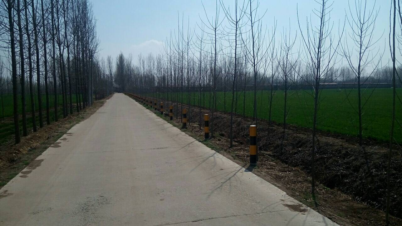 新湖镇轩场村